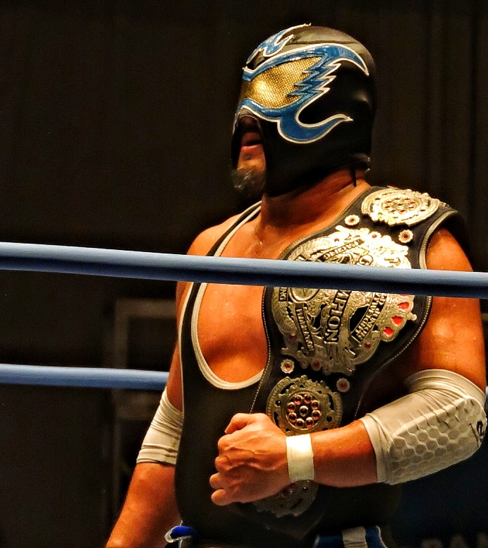 プロレスラーの青木篤志選手